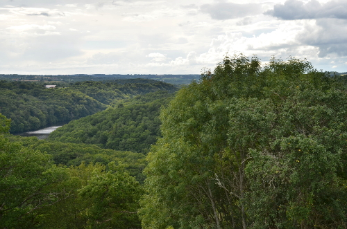 Vue du Bourg d'Hem en pays Dunois.